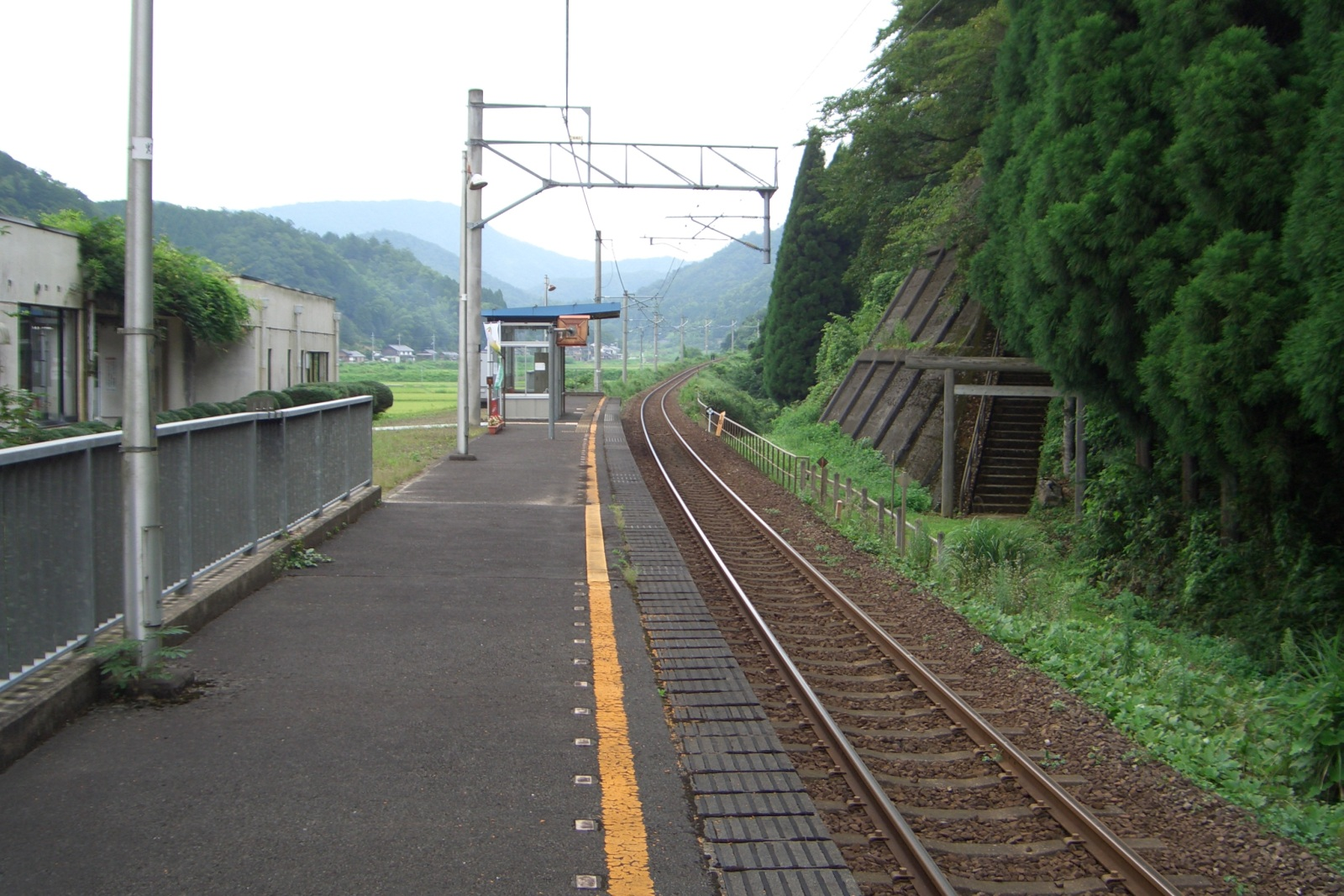 北近畿タンゴ鉄道宮福線二俣駅のりば。福知山方より北を望む。